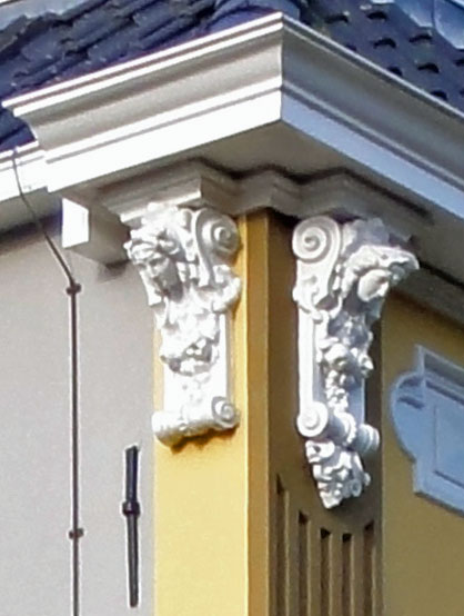 Eysingahuis, Hoofdstraat 46 Beetsterzwaag (detail consoles met maskers)